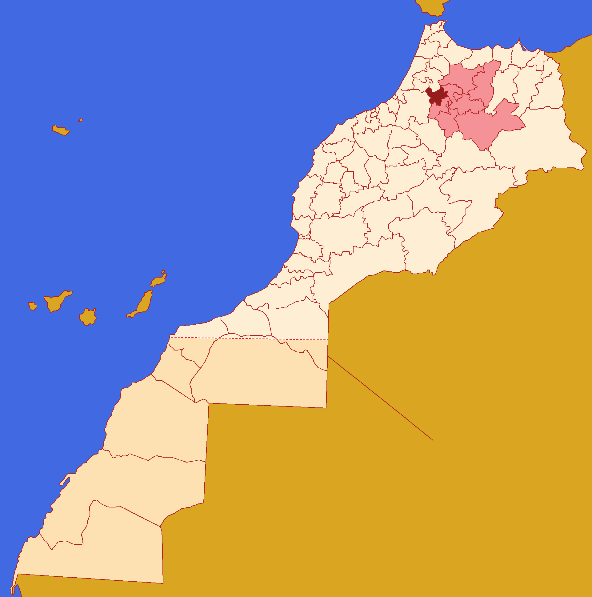 Localização da prefeitura, dentro da região Fez-Meknès, dentro de Marrocos, conforme reforma administrativa de 2015